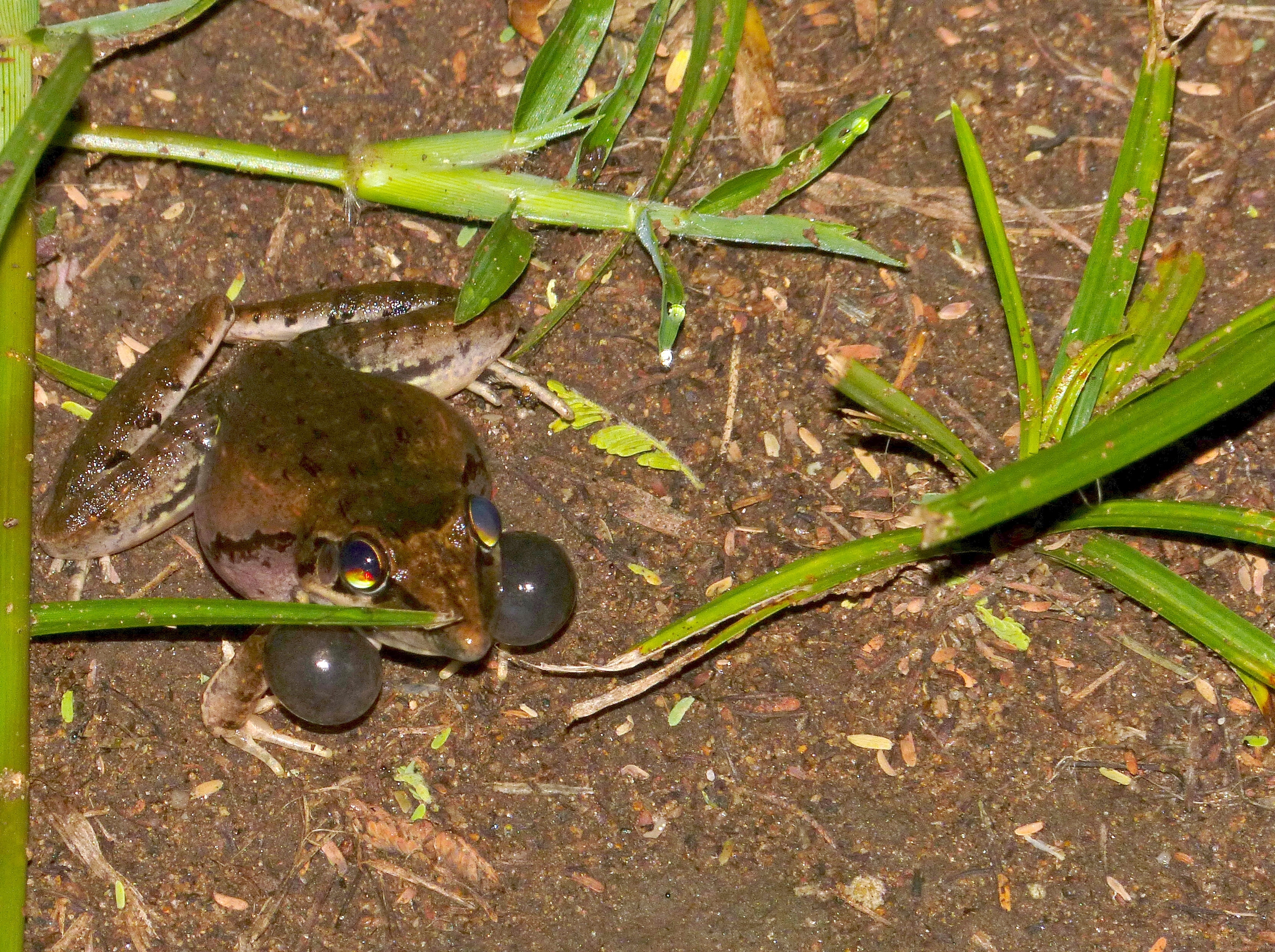 Letaba Camp, Kruger NP, SOUTH AFRICA